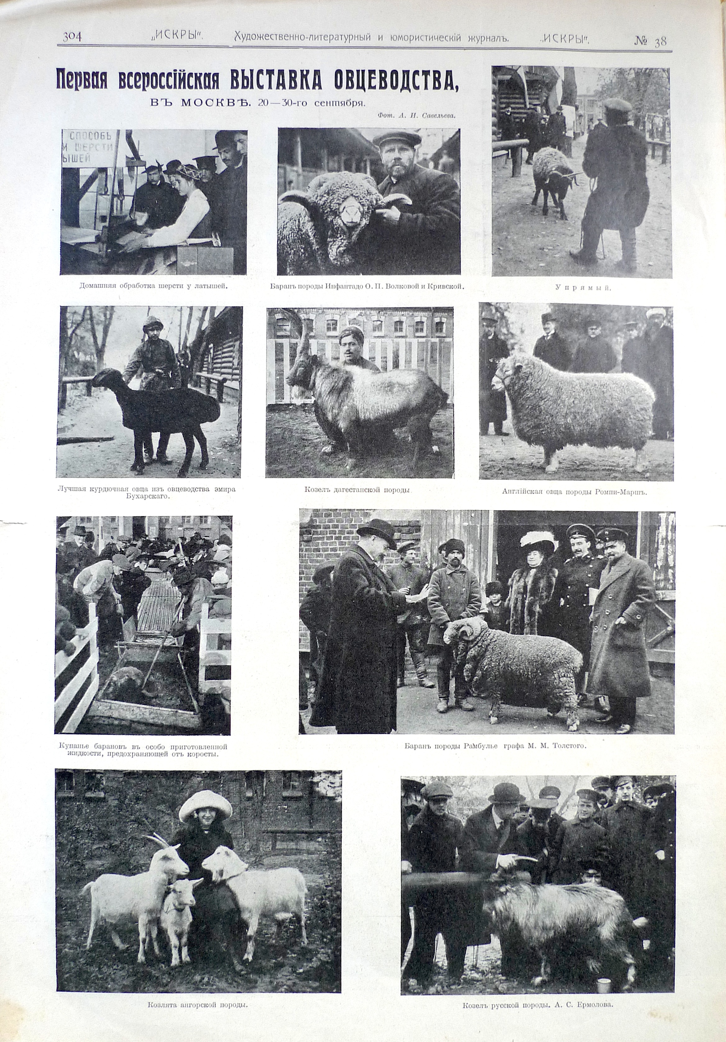 Иллюстрированный художественно-литературный и юмористический журнал с карикатурами «Искры». № 38.